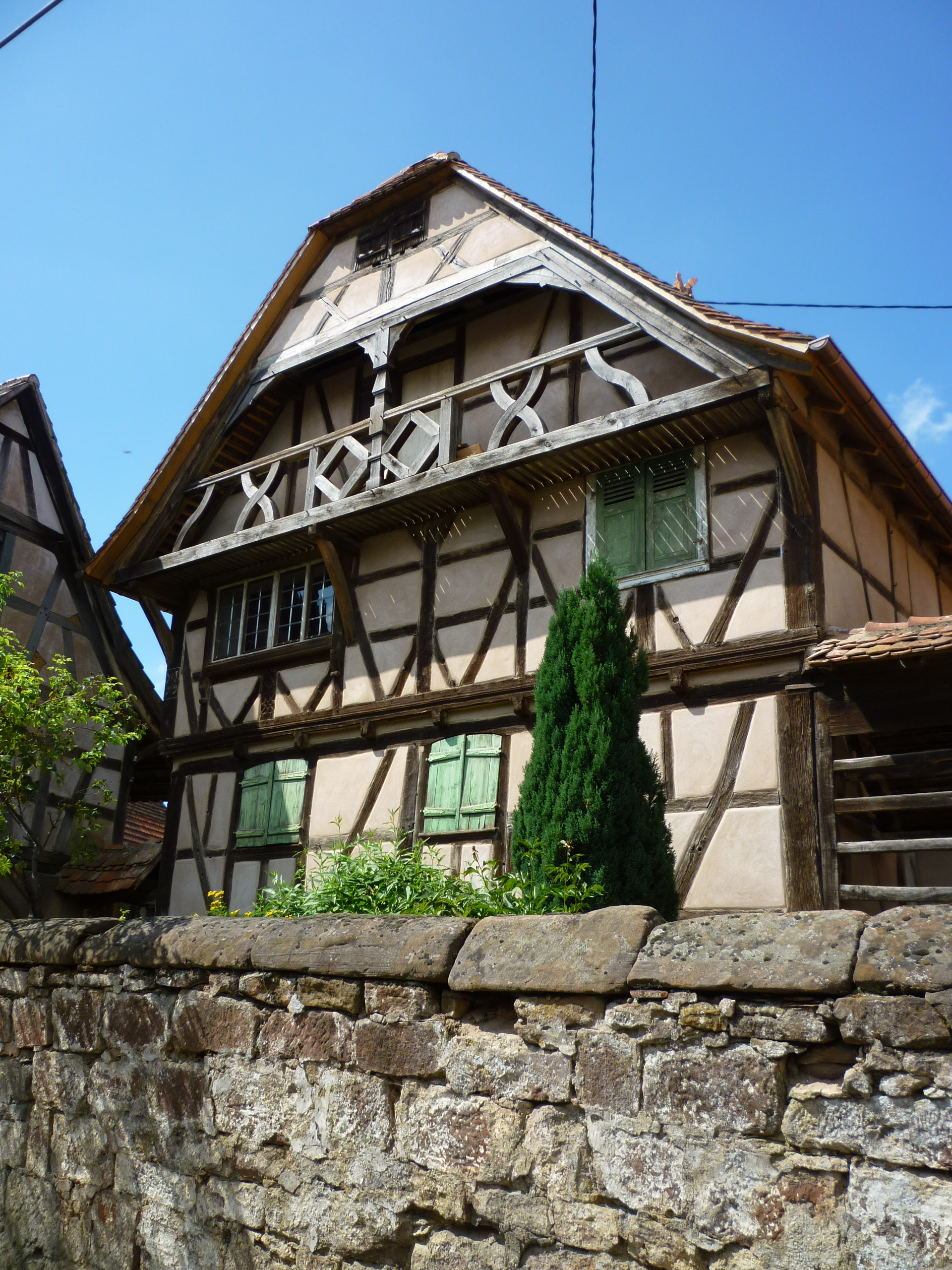 Ferme Jacob This building is indexed in the Base Mérimée, a database of architectural heritage maintained by the French Ministry of Culture, under the references PA00084663 and IA67009715 .